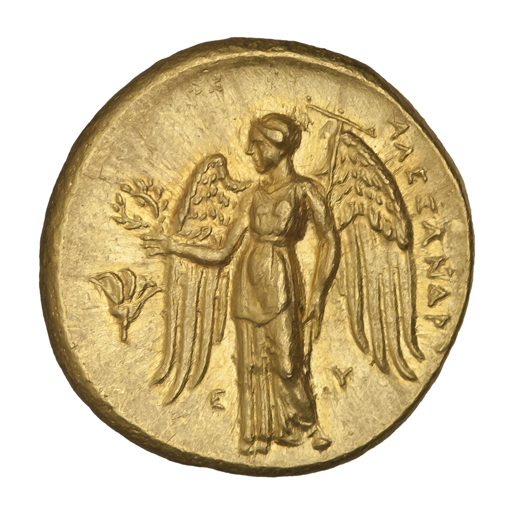 Македонское царство. Мемфис. Александр III Великий (336—323 гг. до н.э.). Посмертная чеканка. Статер. 332—323 гг. до н.э. Реверс. Надпись AΛEΞAΝΔPOY. Фигура Ники, влево; в правой руке венок, в левой — стилис (мачта корабля). По бокам от фигуры буквы E-Y. Слева на поле цветок розы.